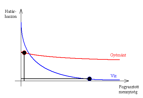 A víz és a gyémánt határhaszon-függvényeinek egymáshoz viszonyított elhelyezkedése